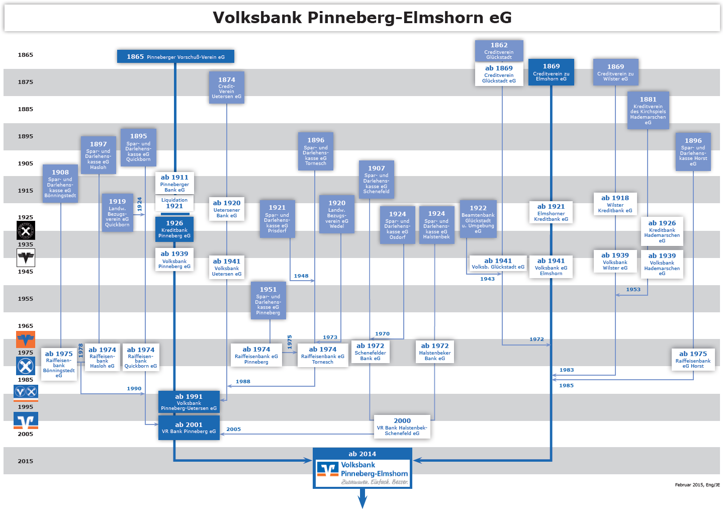 Stammbaum nach Fusionen seit Gründung 1865